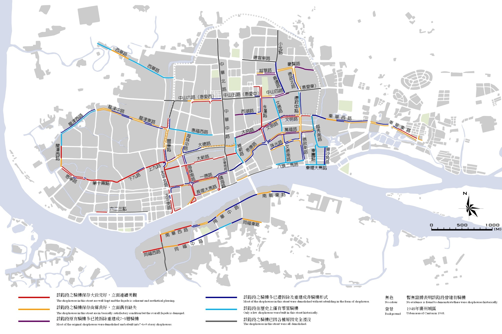 廣州騎樓保留現狀（2014年）示意圖，由徐聖傑製作，街道圖以中華民國三十七年（1948年）作為背景。